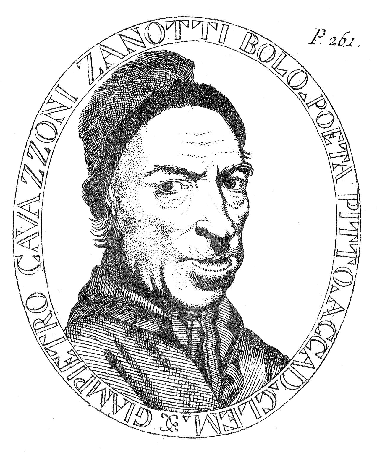 Ritratto di Giampietro Cavazzoni Zanotti bolognese poeta e pittore dell'accademiaclementina